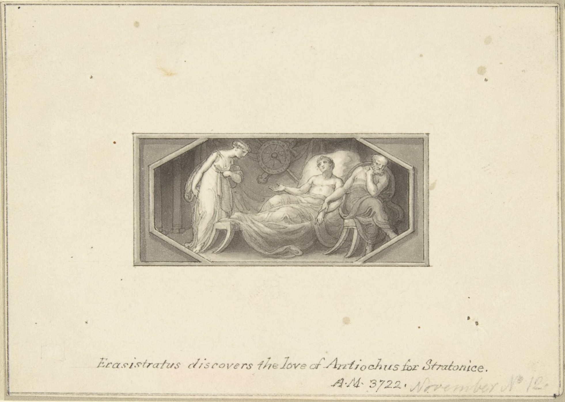 Drawing; Drawings